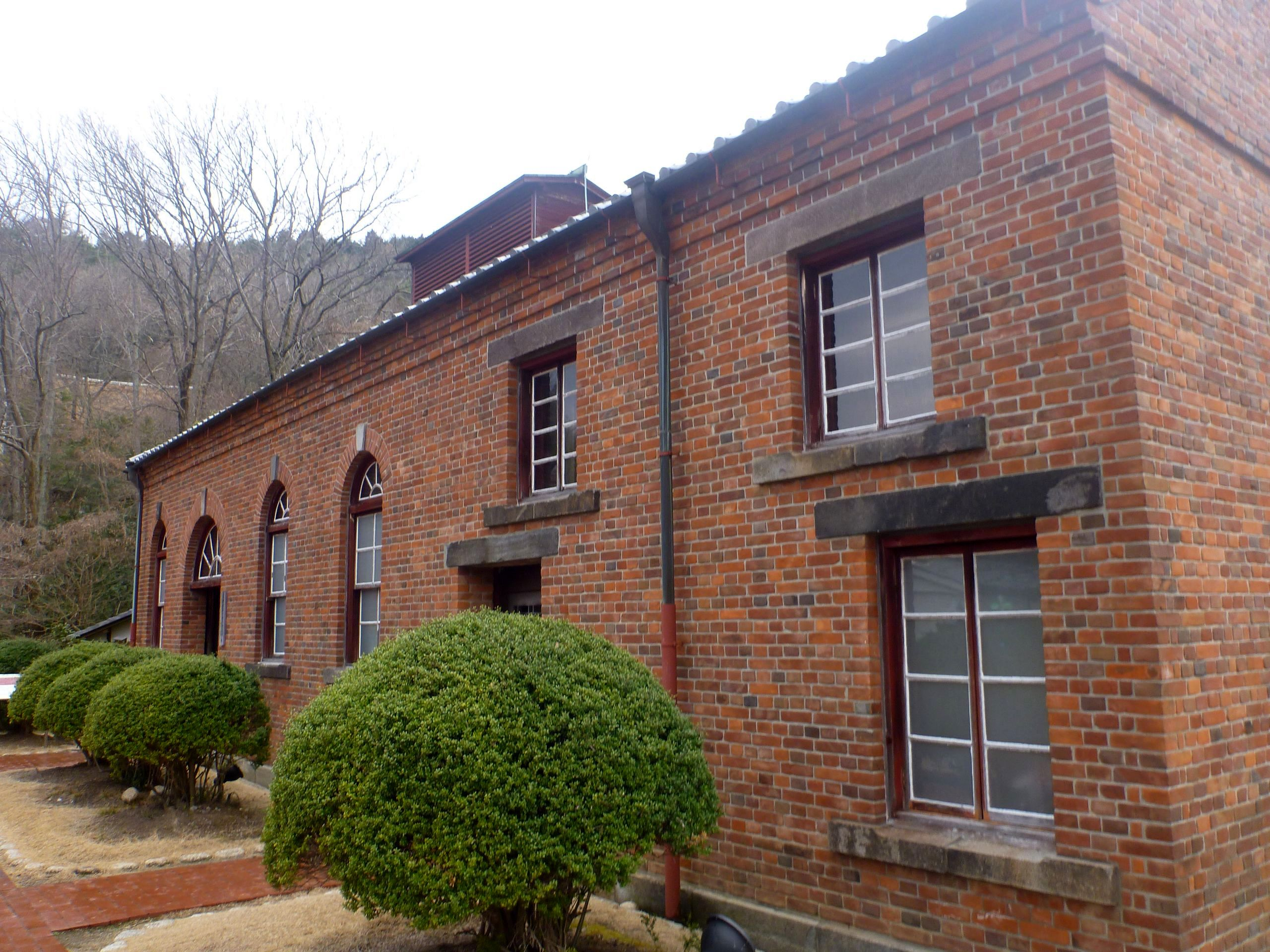 工部省品川硝子製造所（登録有形文化財）